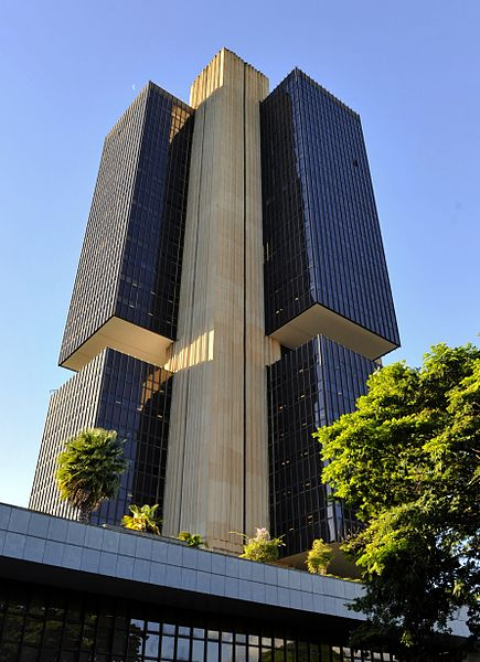 ธนาคารกลางของบราซิลในบราซิเลีย